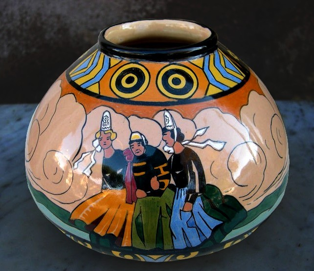 Vase à décor régionaliste par Jim Sevellec, Quimper, Manufacture Henriot, XXe siècle, France.